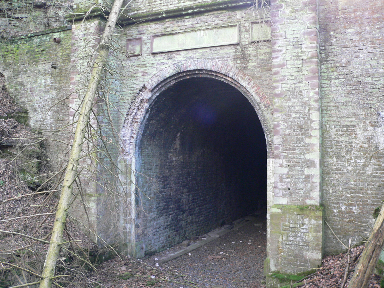 Nordportal des Tunnels zwischen Trendelburg und Wülmersen der ehemaligen Carlsbahn (km 7,6 bis 7,8) Fotograf: selbst fotografiert Datum: 12.02.2006